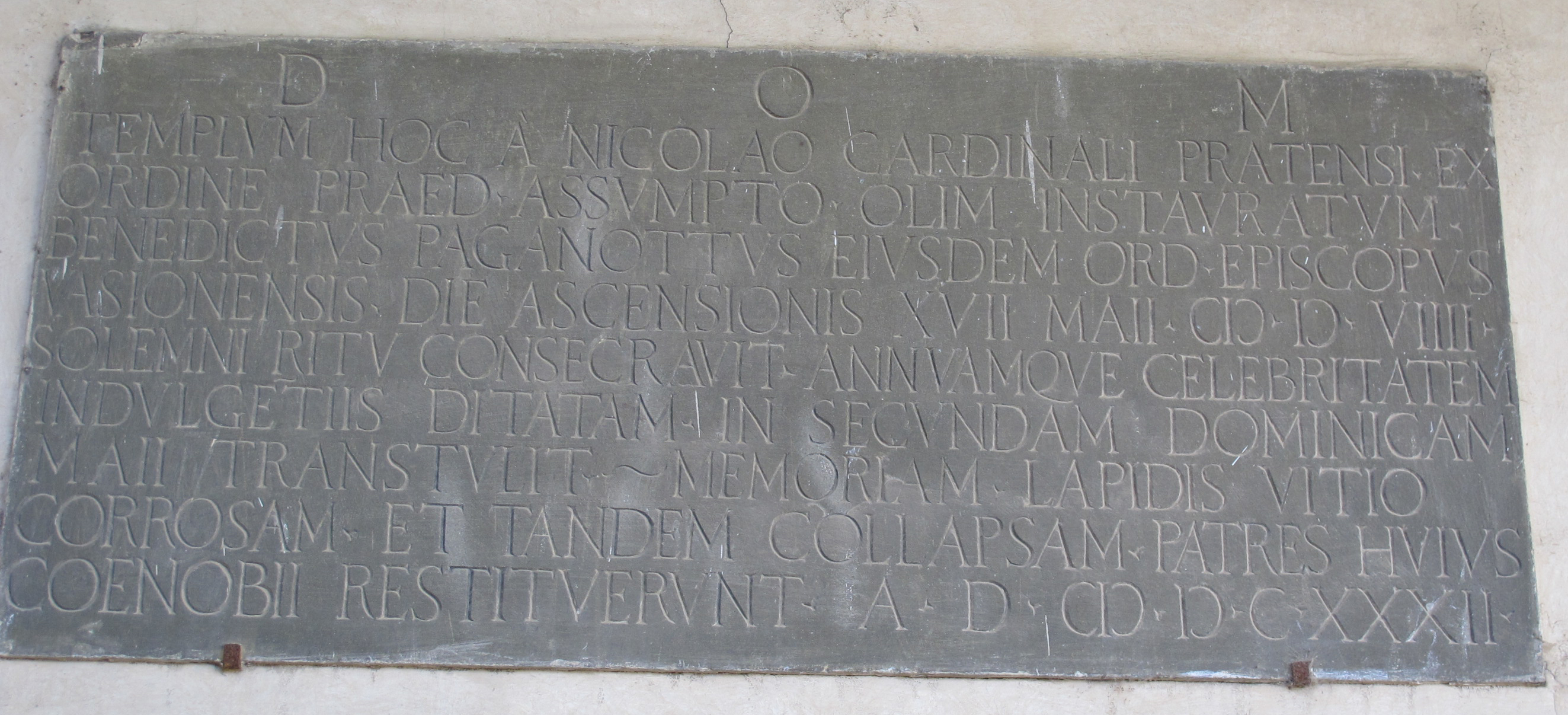 Chiostro di s. domenico, po, targa cardinale niccolò da prato